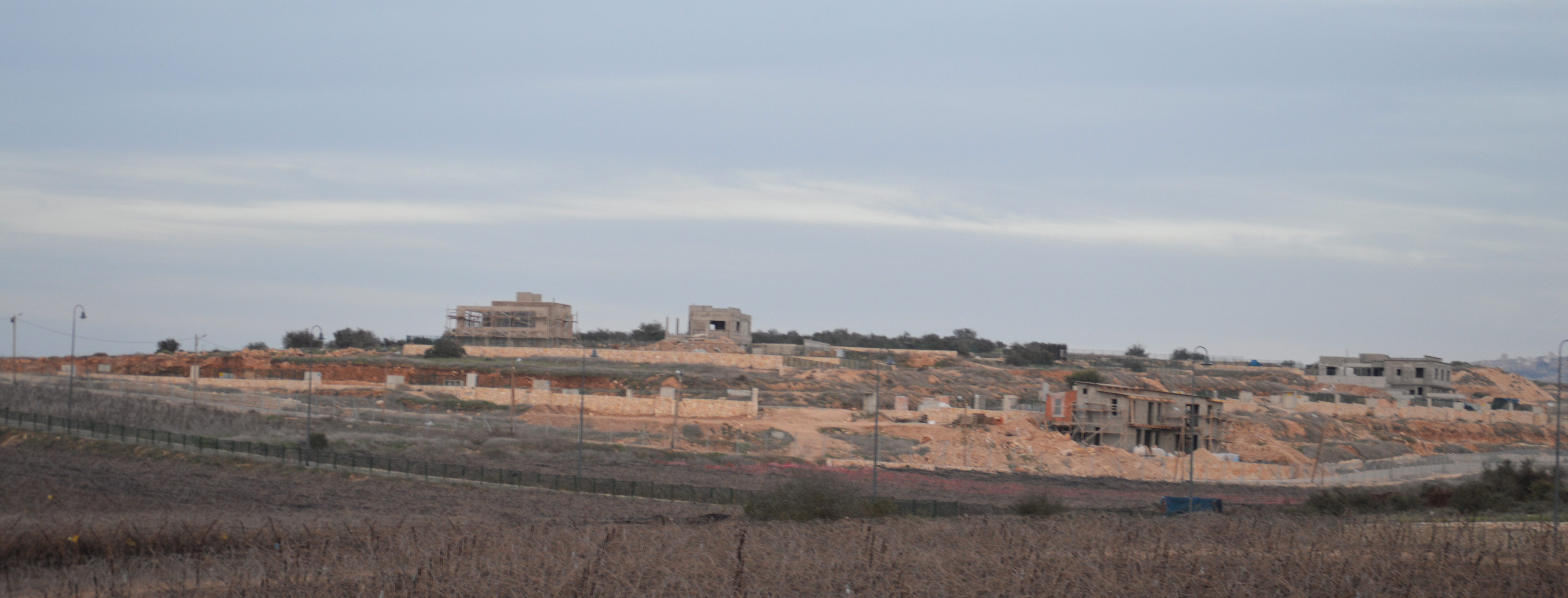 מבני הישוב אליאב בבניה